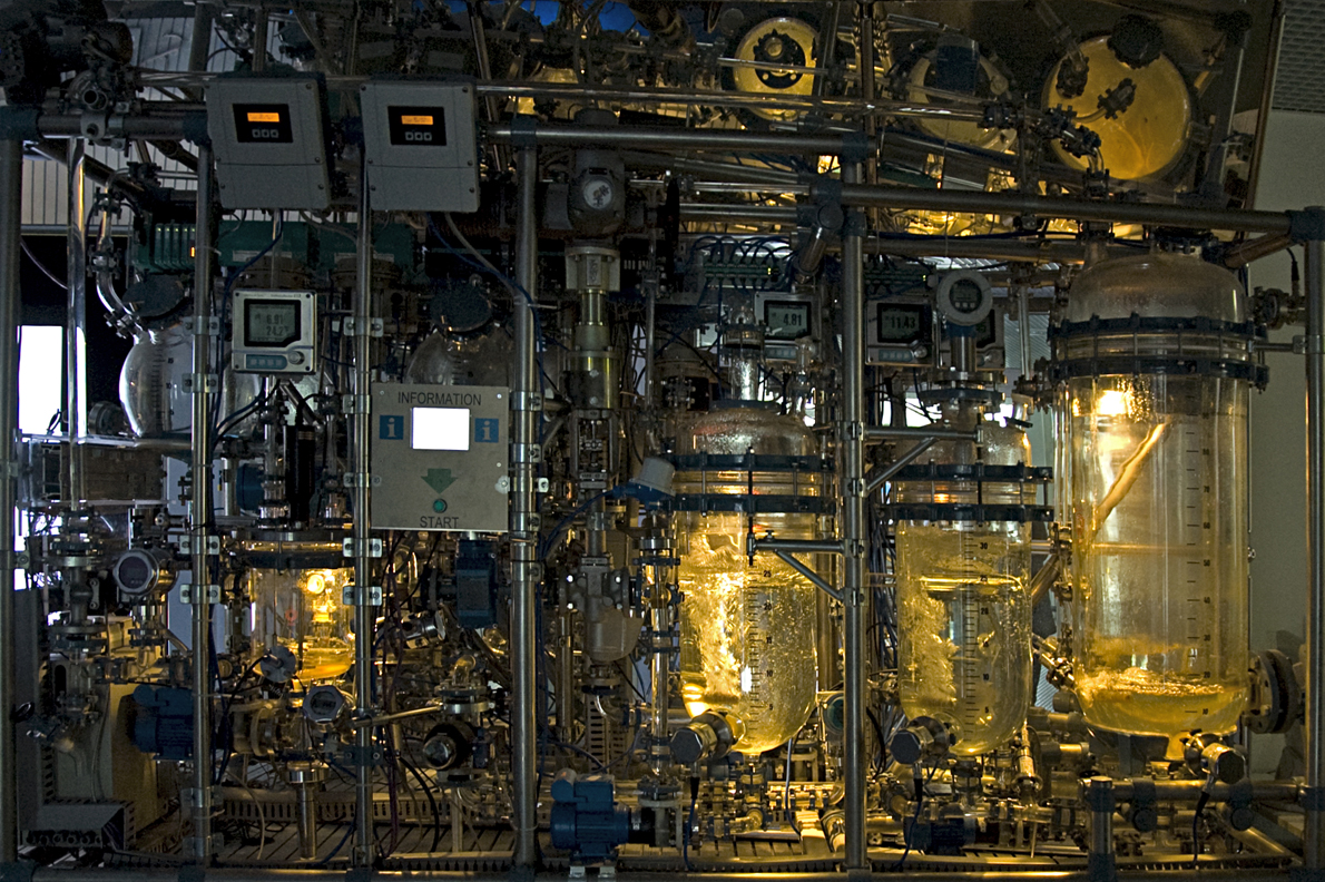 Forschungs-Campus Garching - der Versuch in der Fakultät für Maschinenwesen Die Technische Universität München (kurz TUM oder TU München) ist die einzige Technische Universität in Bayern. Sie ist eine der größten Technischen Hochschulen in Deutschland und zählt zu den auch international renommierten deutschen Spitzenuniversitäten. Ihr Stammsitz ist München. Sie gehört zu den drei ersten Universitäten, die im Rahmen der Exzellenzinitiative in die Förderlinie "Zukunftskonzept" aufgenommen wurden. Sie ist in das Elitenetzwerk Bayern eingebunden. An der TU München werden 133 Studiengänge angeboten. An der TU München sind über 23.000 Studenten eingeschrieben. Die Ludwig-Maximilians-Universität München (kurz: LMU oder Uni München) ist eine Universität in der bayerischen Landeshauptstadt München. Sie ist nach ihrem Gründer Herzog Ludwig dem Reichen sowie dem Kurfürsten Max IV. Joseph benannt. An der Ludwig-Maximilians-Universität München sind über 41.000 Studenten eingeschrieben (aus Wikipedia)